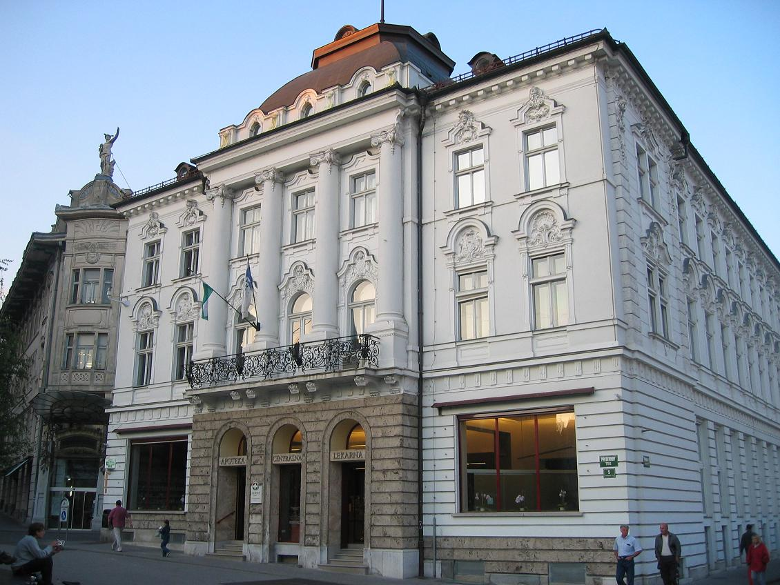 Državna lekarna palace, (Prešernov trg 5) Ljubljana photo:Ziga 21:29, 27 April 2006 (UTC)